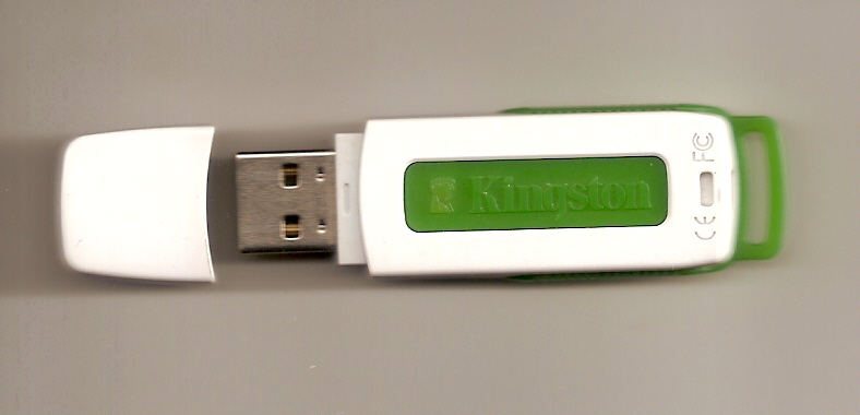 Um pendrive kingston de 2GB